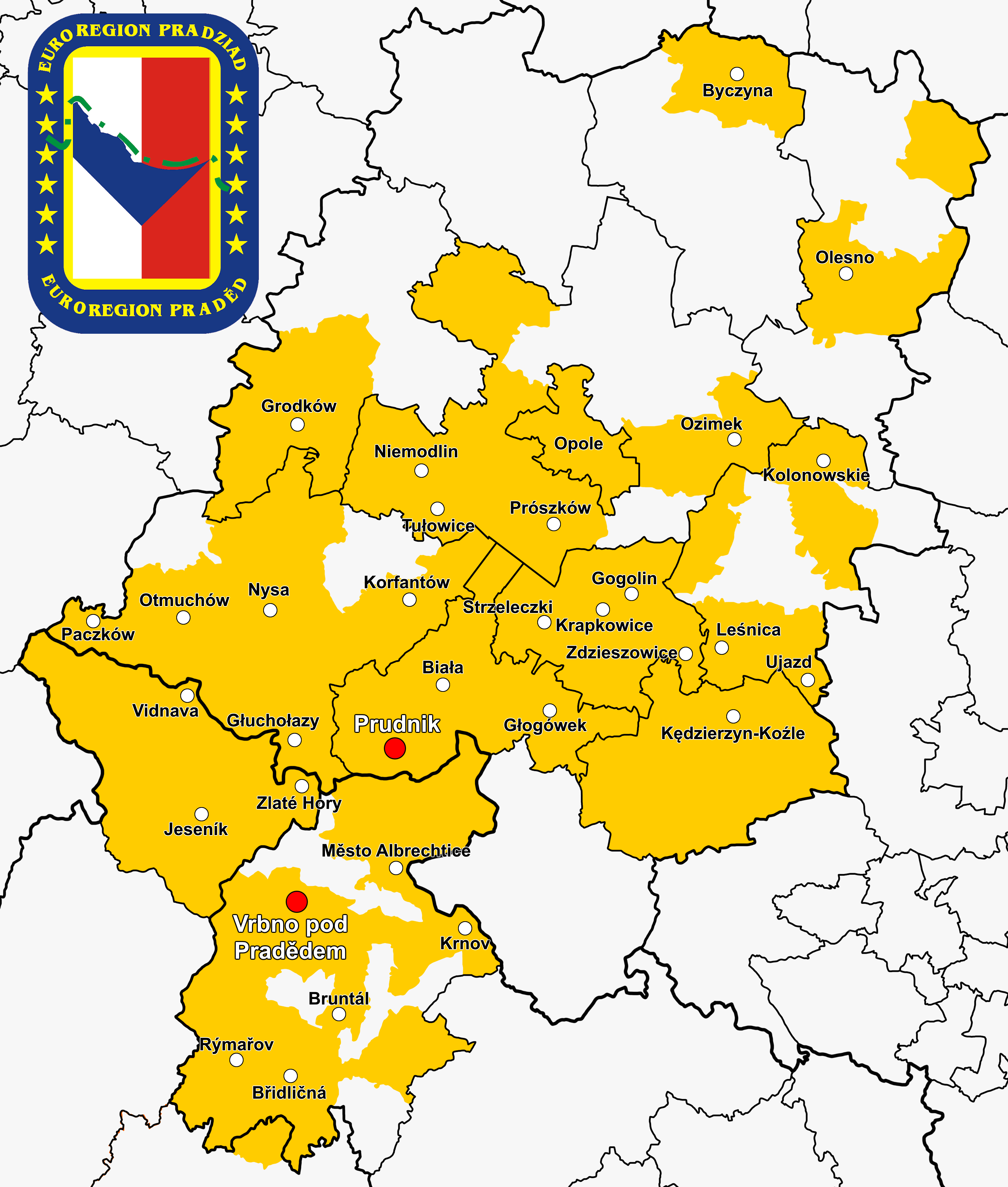 Mapa Euroregionu Pradziad.